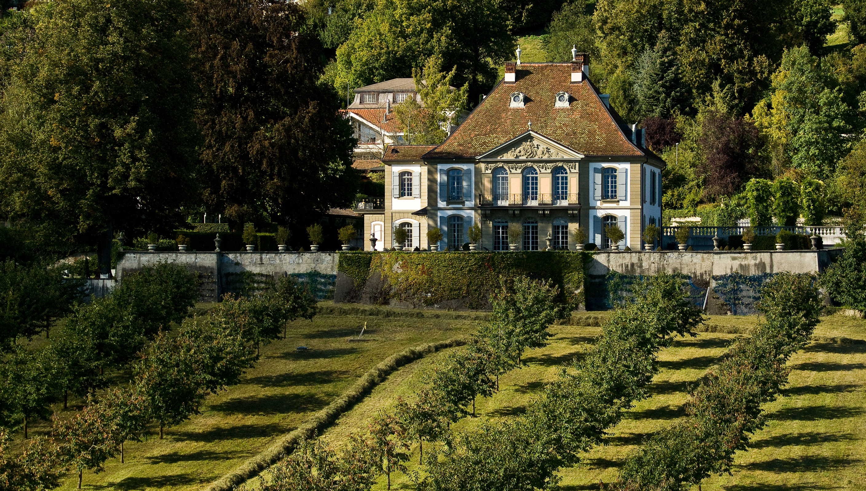 Schloss Gümligen von einem erhöhten Standort aus. Erbaut 1736 bis 1739 unter dem Architekten Albrecht Stürler. Sorgfältig renoviert vom aktuellen Besitzer in den Jahren ab 2000.